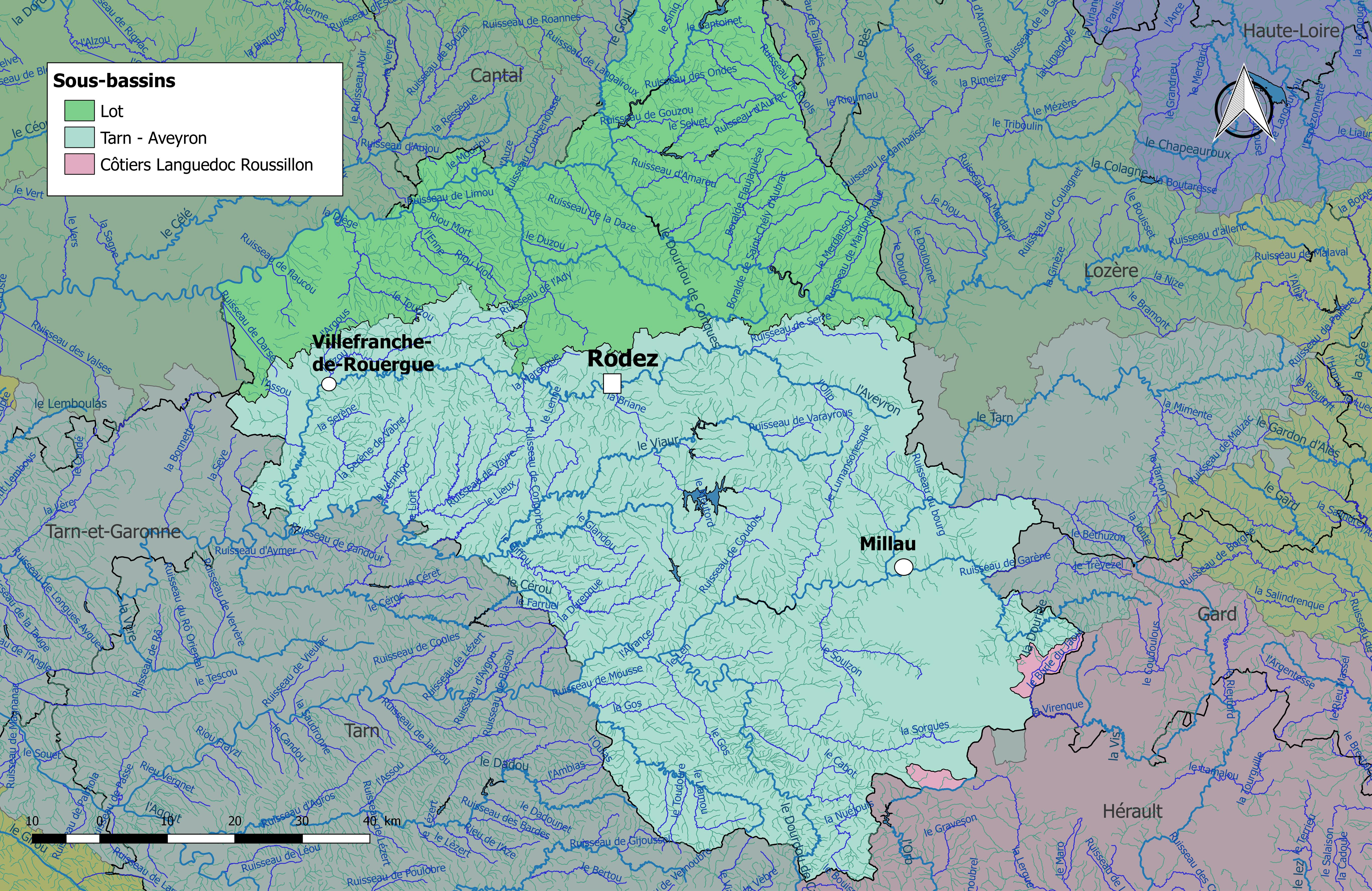 Carte des bassins hydrographiques du département de l'Aveyron (France).